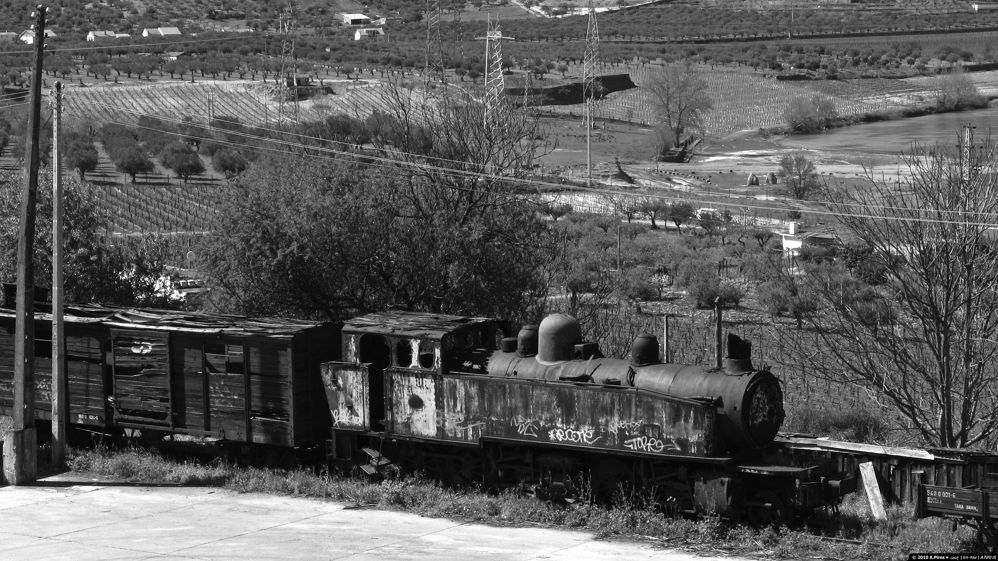 O que resta do material circulante que circulou pela já (quase) inexistente Linha do Sabor